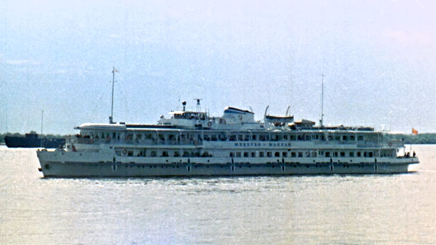 Теплоход «Миклухо-Маклай», Хабаровск, лето 1982 года.